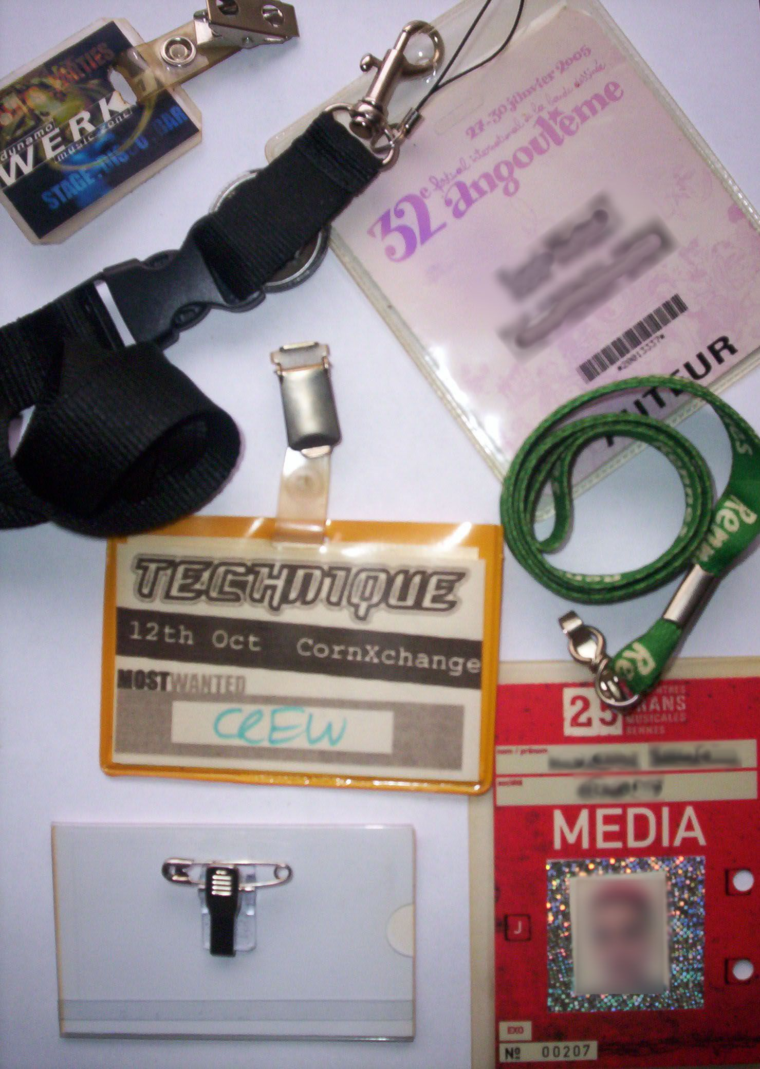 Badge02.JPG